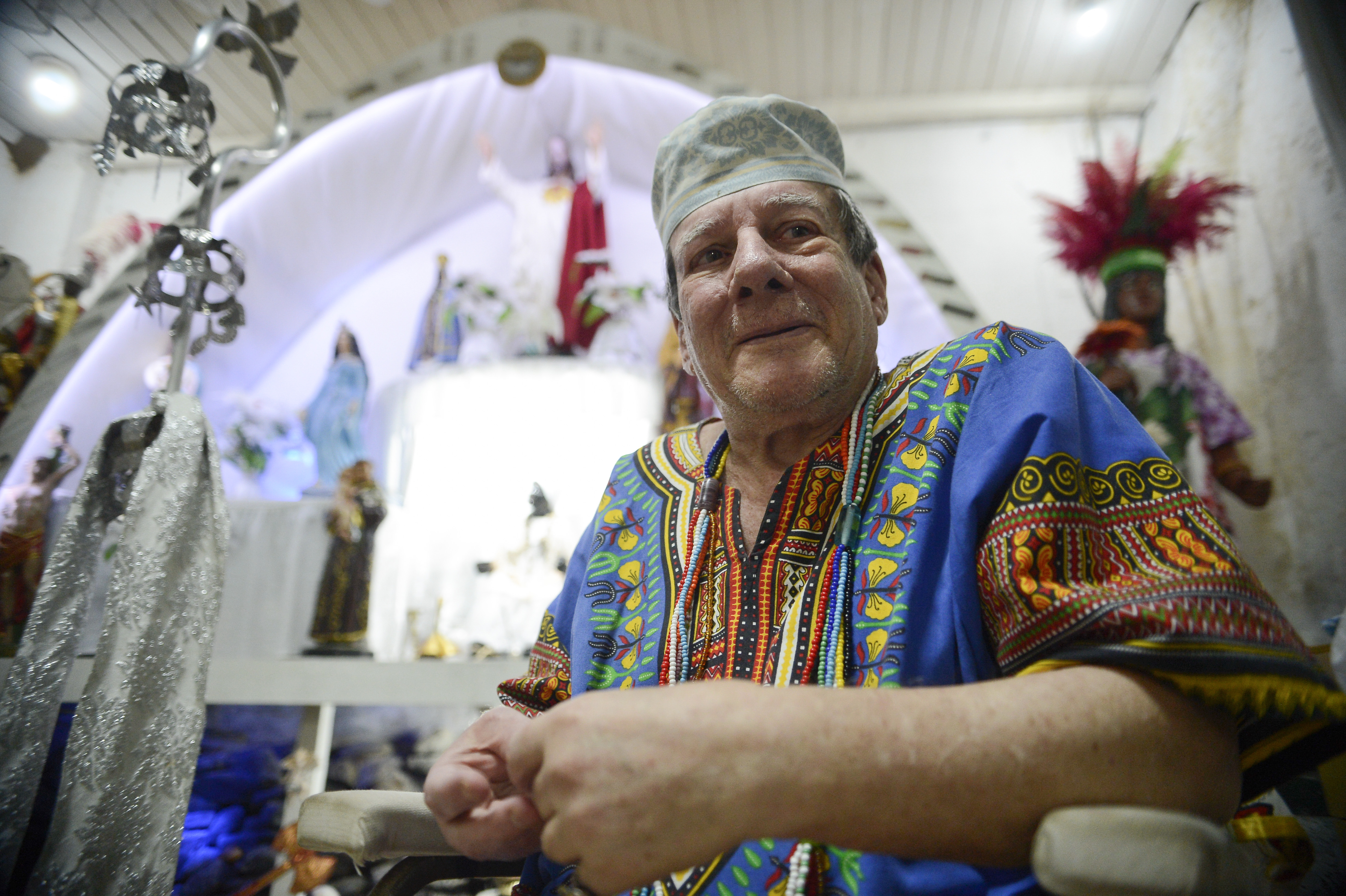 Rio de Janeiro - pai Zezinho de Ogum, pai de santo do terreiro Tenda Espírita Vovó Maria Conga de Aruanda, a primeira instituição cadastrada no mapa de terreiros de Ubanda do Rio de Janeiro (Tânia Rêgo/Agência Brasil)